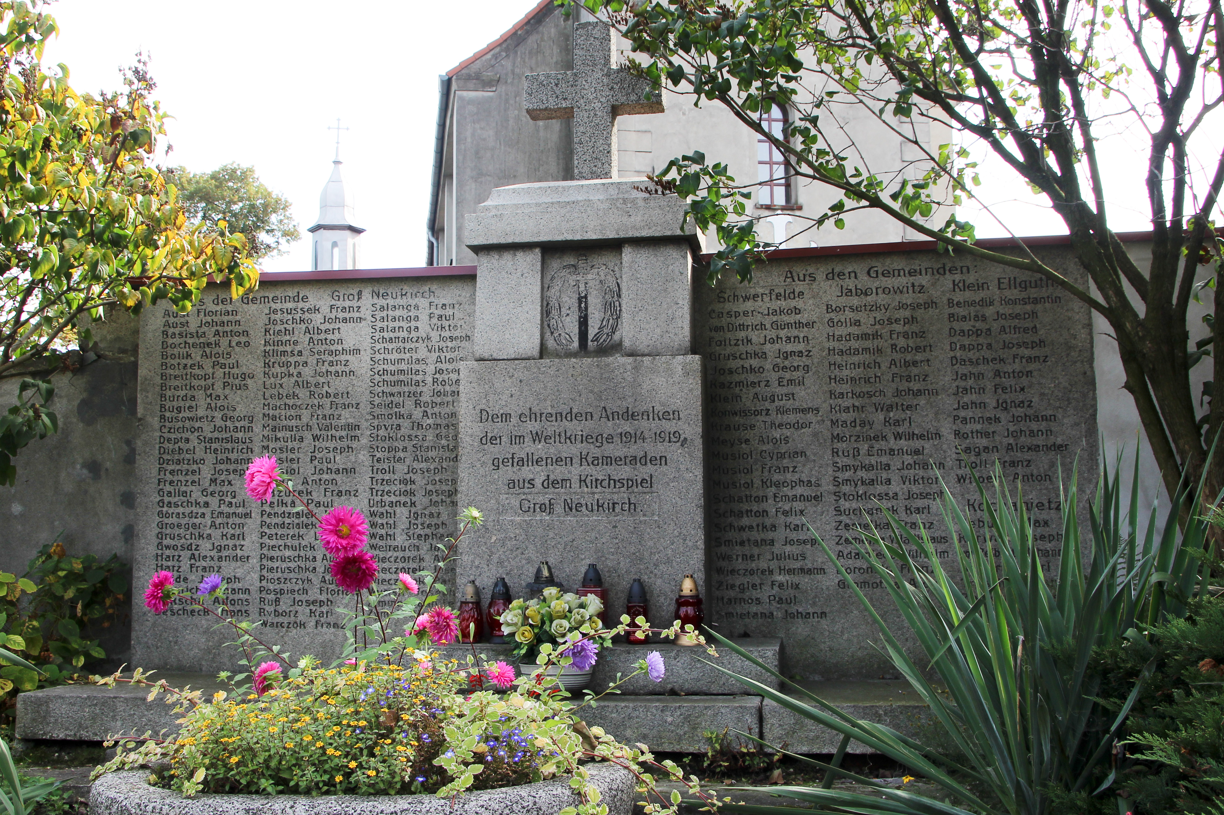 Polska Cerekiew (w j. niem. Groß Neukirch) – wieś w Polsce położona w województwie opolskim, w powiecie kędzierzyńsko-kozielskim, w gminie Polska Cerekiew.